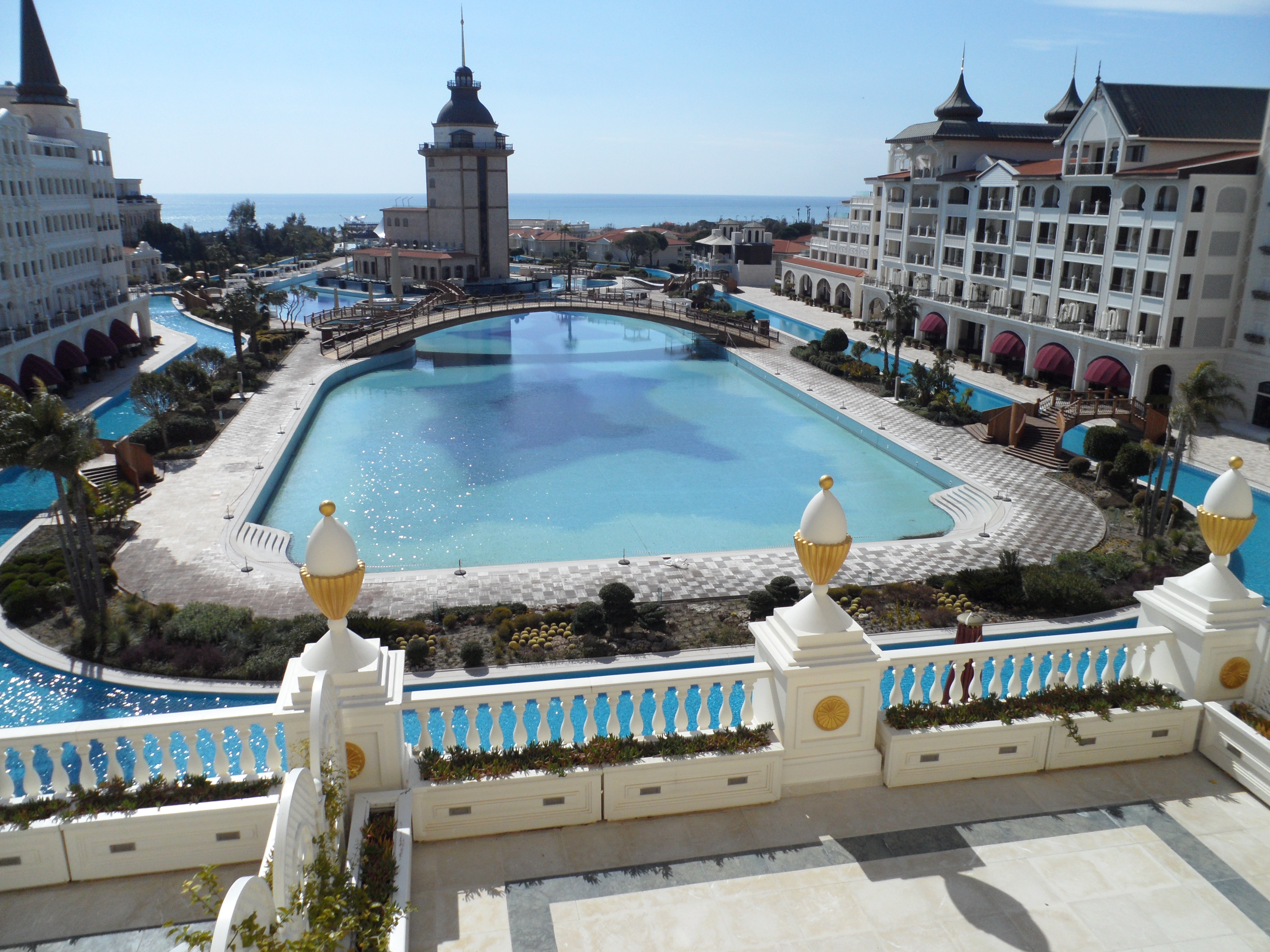 Вид на бассейн отеля "Mardan Palace"